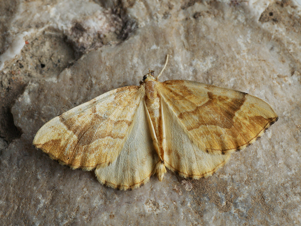 Exemplar found: Russia, Moscow Oblast, Odintsovsky District, near village Pestovo, 12.07.2017, by light МО, Одинцовский р-н, окрестности деревни Пестово, 12.07.2017, на свет